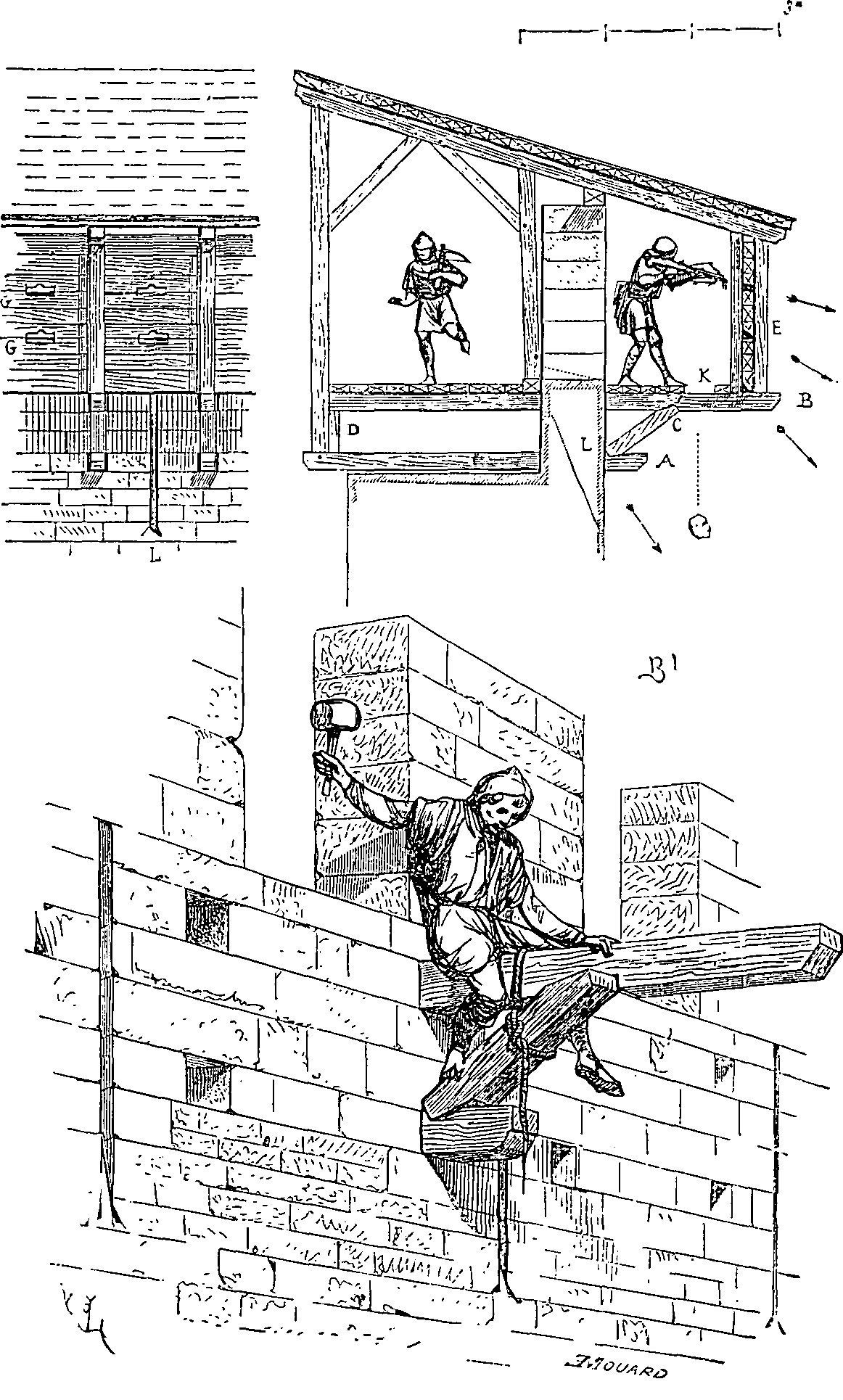 Dessin extrait de l'ouvrage La cité de Carcassonne par Eugène Viollet-le-Duc. Le dessin est intitulé : Figure N°13. Notice Gallica : Type : texte imprimé, monographie Auteur(s) : Viollet-le-Duc, Eugène-Emmanuel (1814-1879). Auteur du texte Titre(s) : La cité de Carcassonne (Aude) [Texte imprimé] / par Viollet Le Duc Publication : Paris : Librairie des imprimeries réunies, 1888 Description matérielle : 85 p. : ill. ; in-8 Sujet(s) : Carcassonne (Aude) -- Cité -- Histoire Notice n° : FRBNF36570974